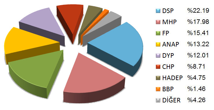 1999 Türkiye Cumhuriyeti Milletvekili Genel Seçimleri - Partilerin aldığı oy oranı